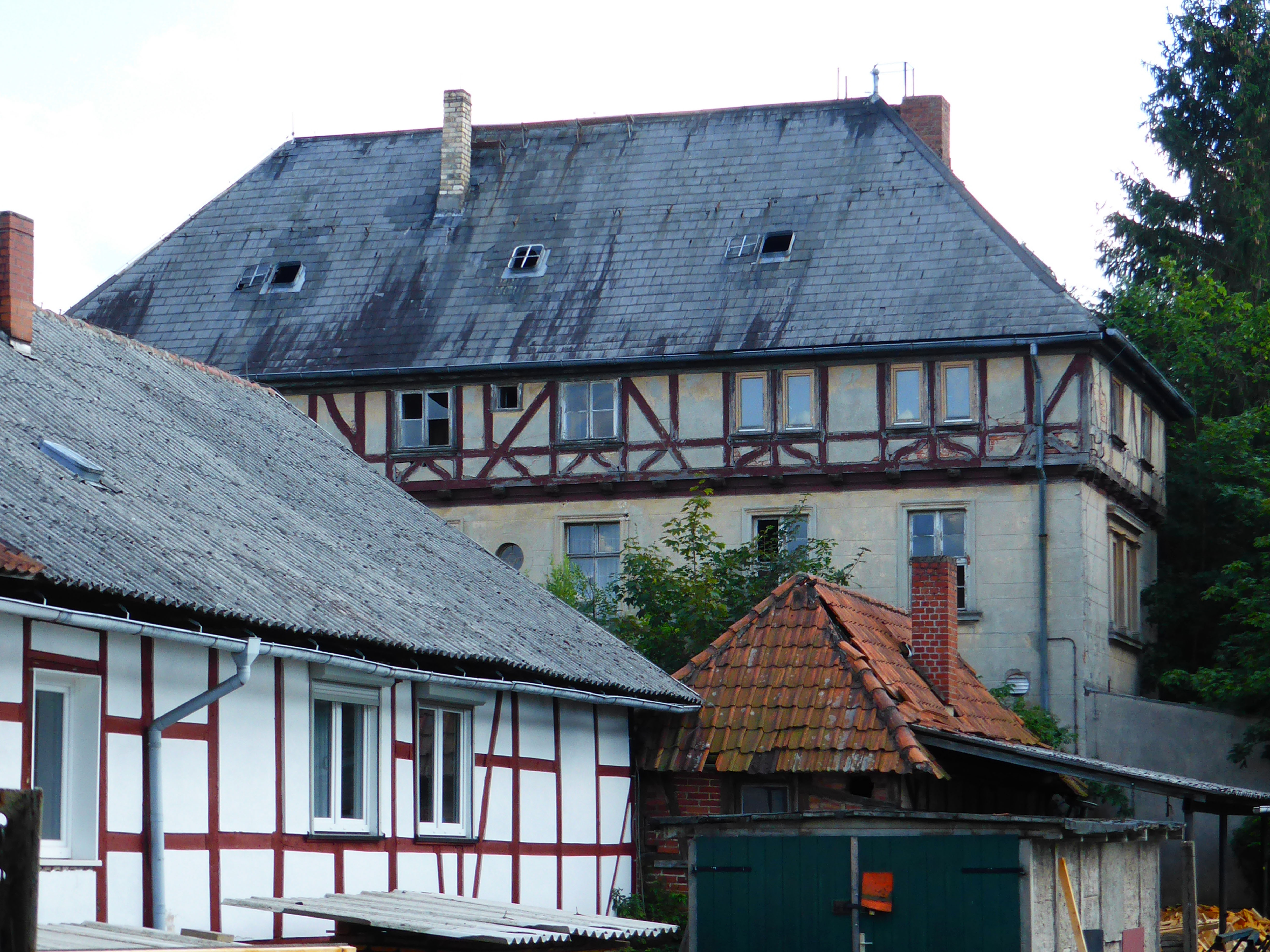 Teilansicht des Apenburger Hofes in Beetzendorf.